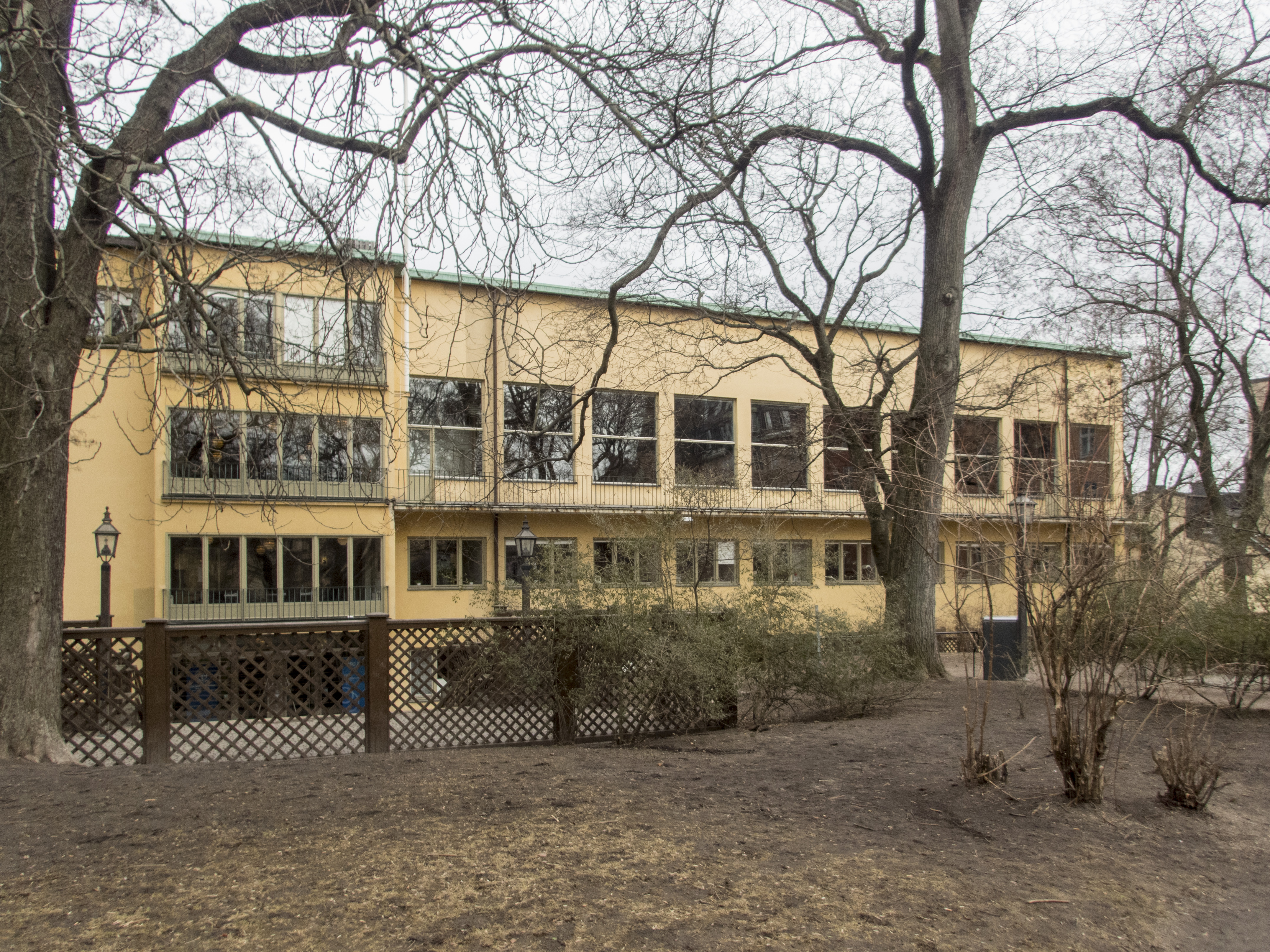 Stockholms Universitets Studentkårs tidigare kårhus, Holländargatan 32 Nybyggnadsår 1935 - 1937 Olle Engkvist (Byggmästare), Paul Hedqvist (Arkitekt), Stockholms Universitets Studentkår (Byggherre)